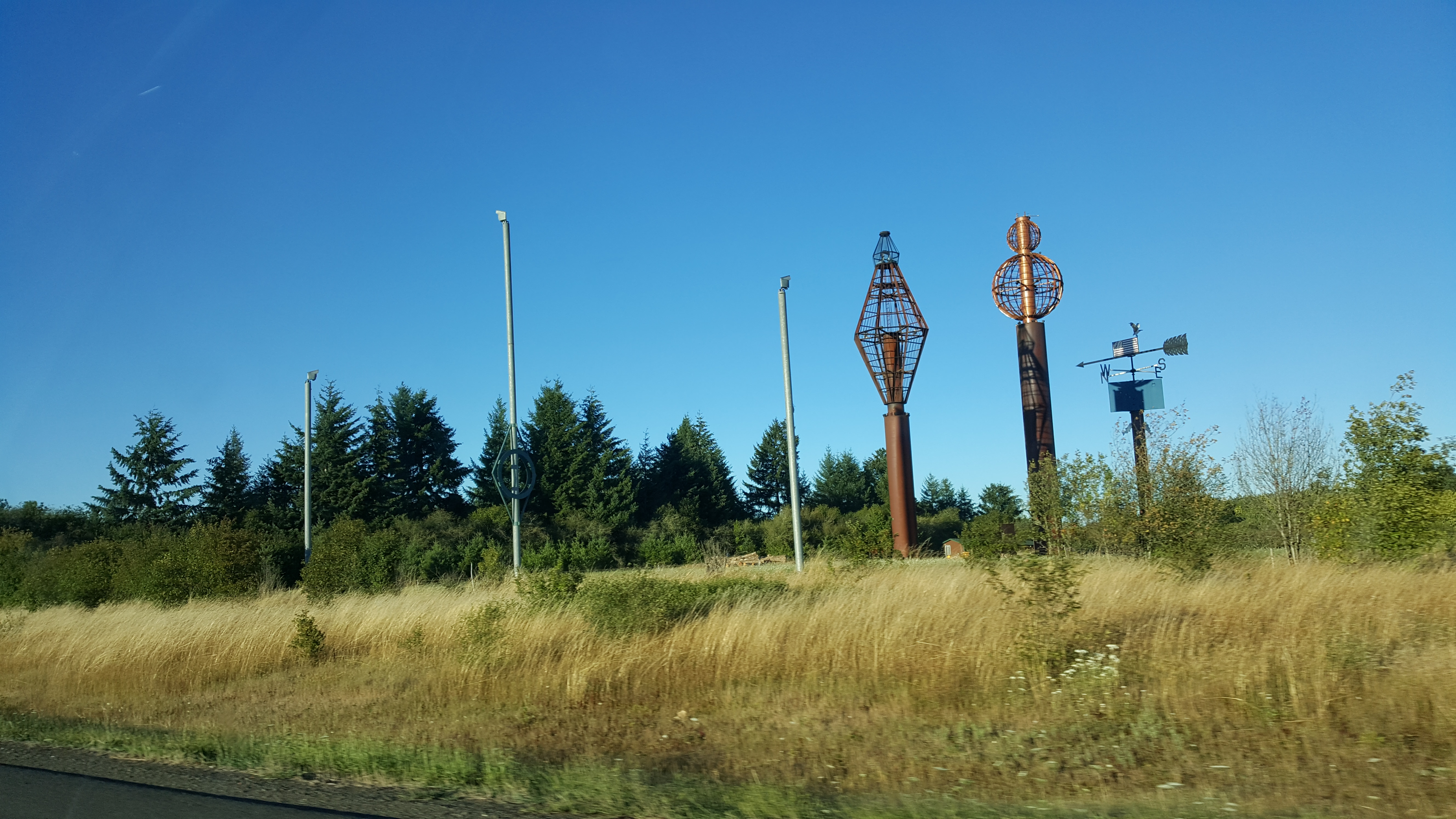 Gospodor Monument Park